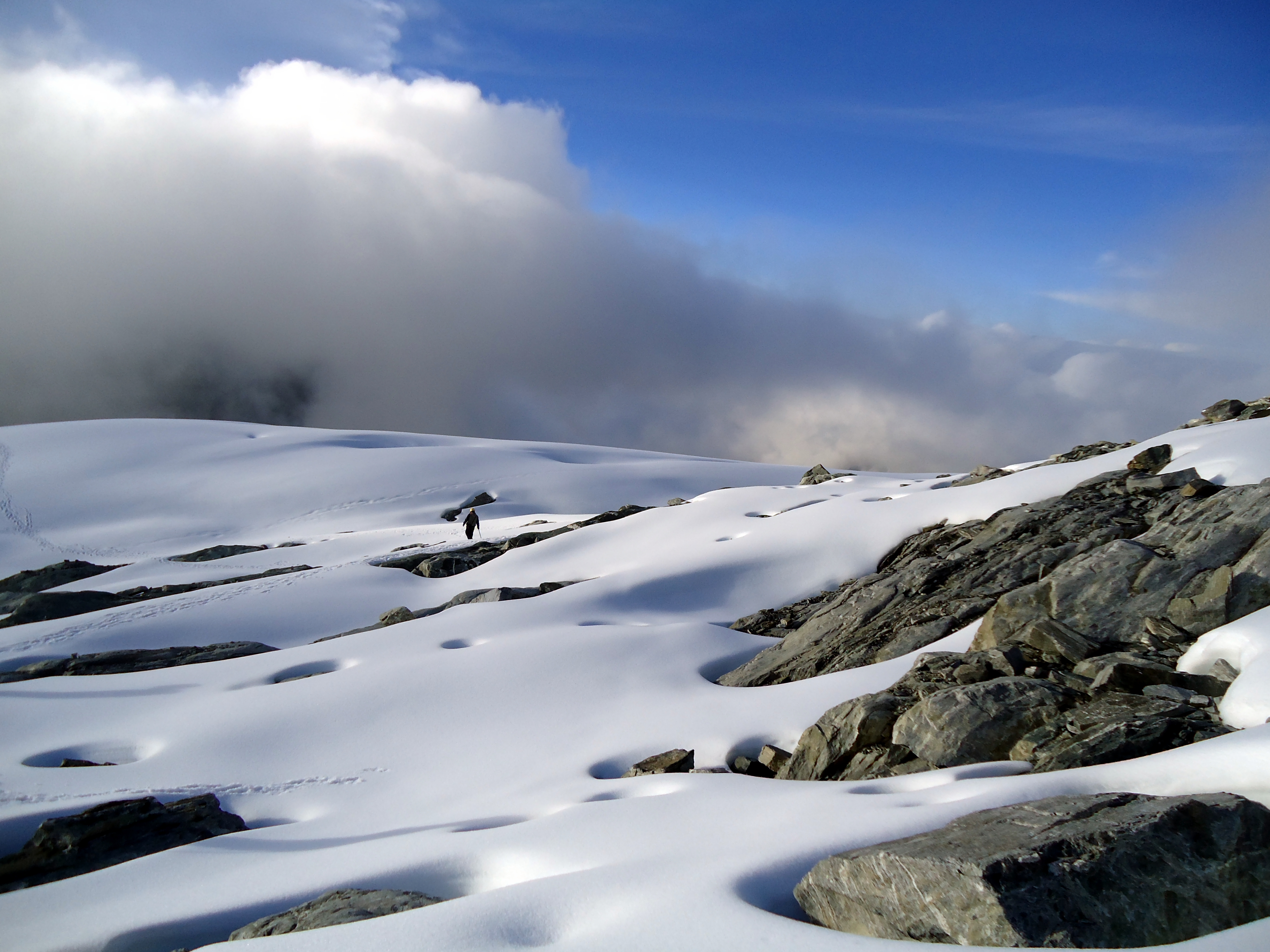 Glacial Pico Humboldt